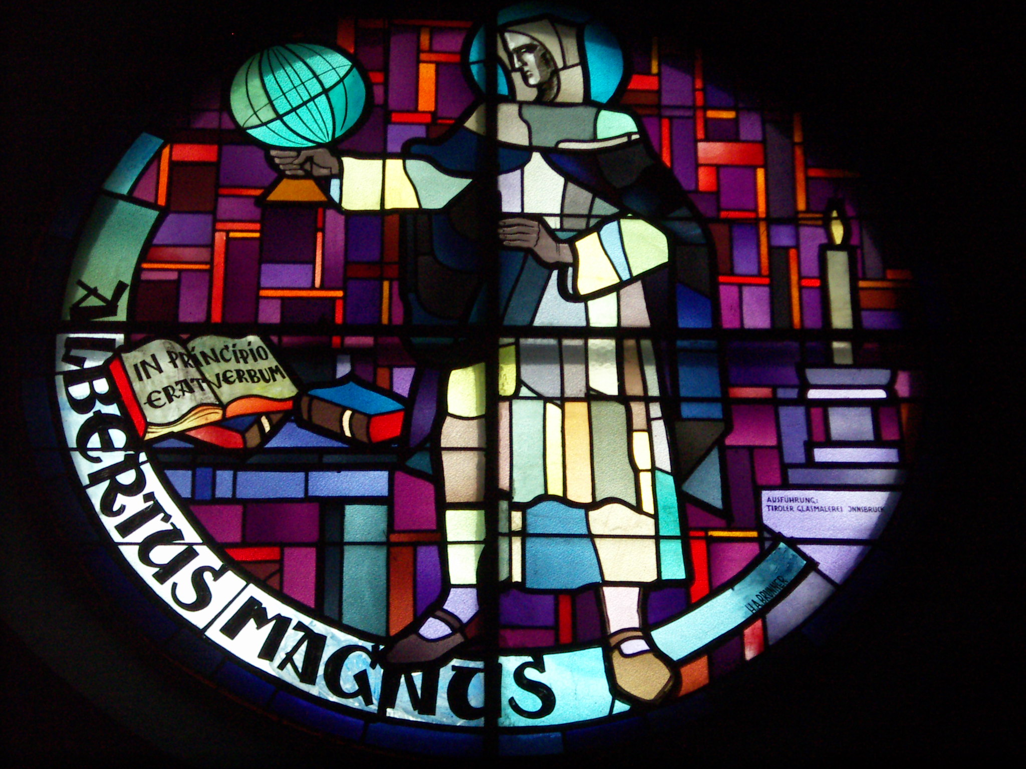 St. Hubertus und Christophorus (Wien), Bleiglasfenster von Hans Alexander Brunner zu Albertus Magnus; Signatur; "H.A.BRUNNER AUSFÜHRUNG: TIROLER GLASMALEREI INNSBRUCK"